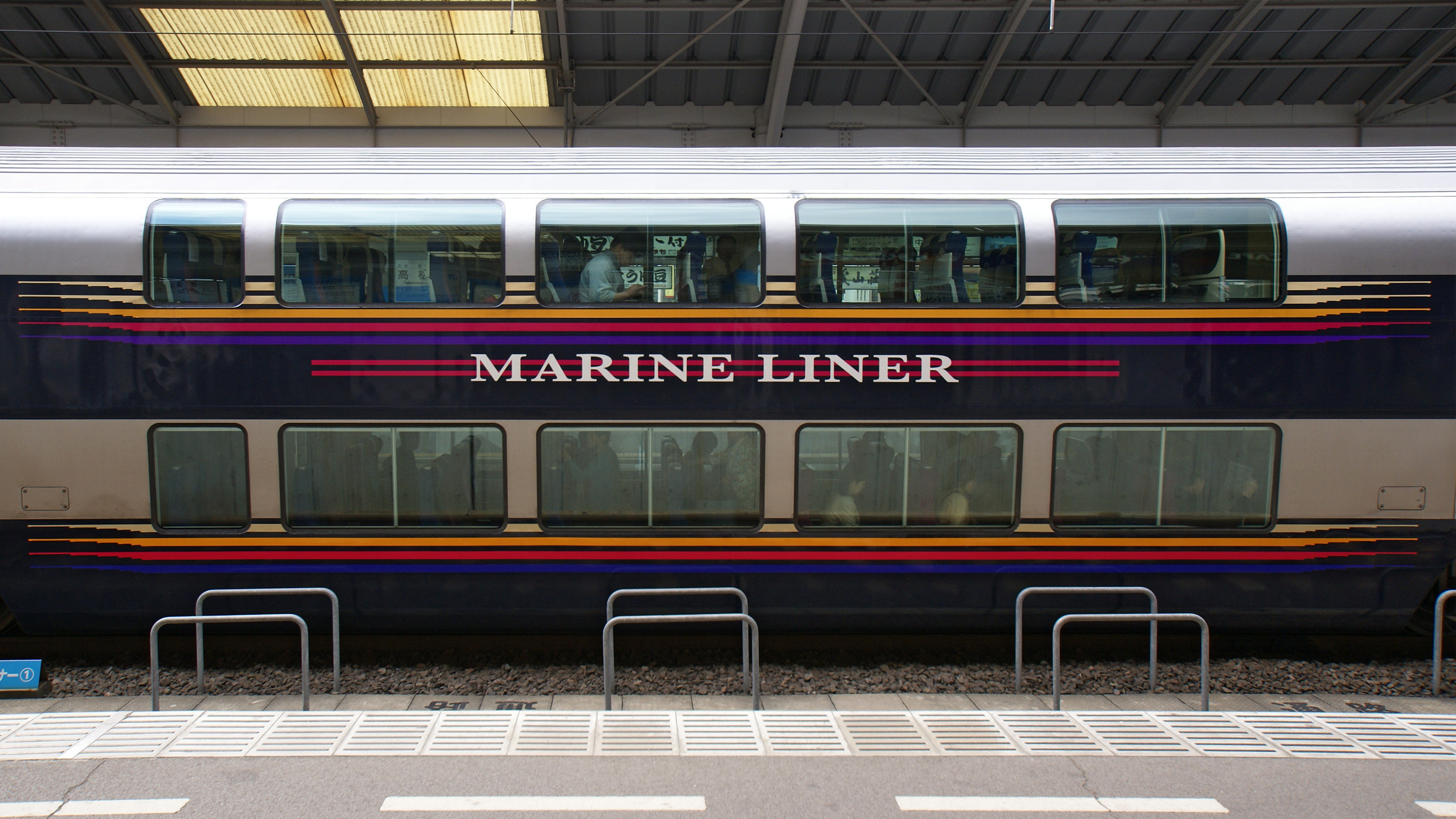 Rapid Service Marine Liner at Takamatsu Station in Takamatsu, Kagawa, Japan